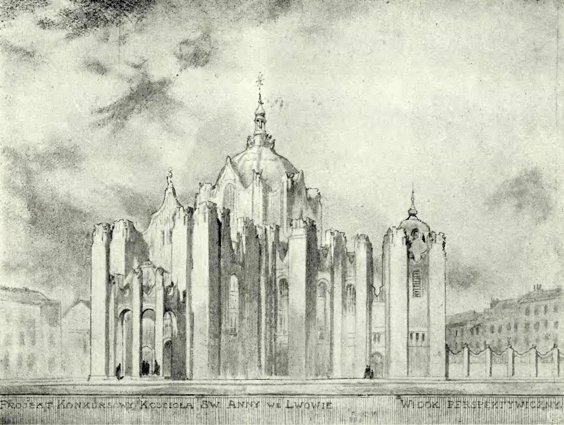 Конкурсний проект нового костелу святої Анни. 1912 рік. Архітектор Оскар Сосновський (1880—1939).